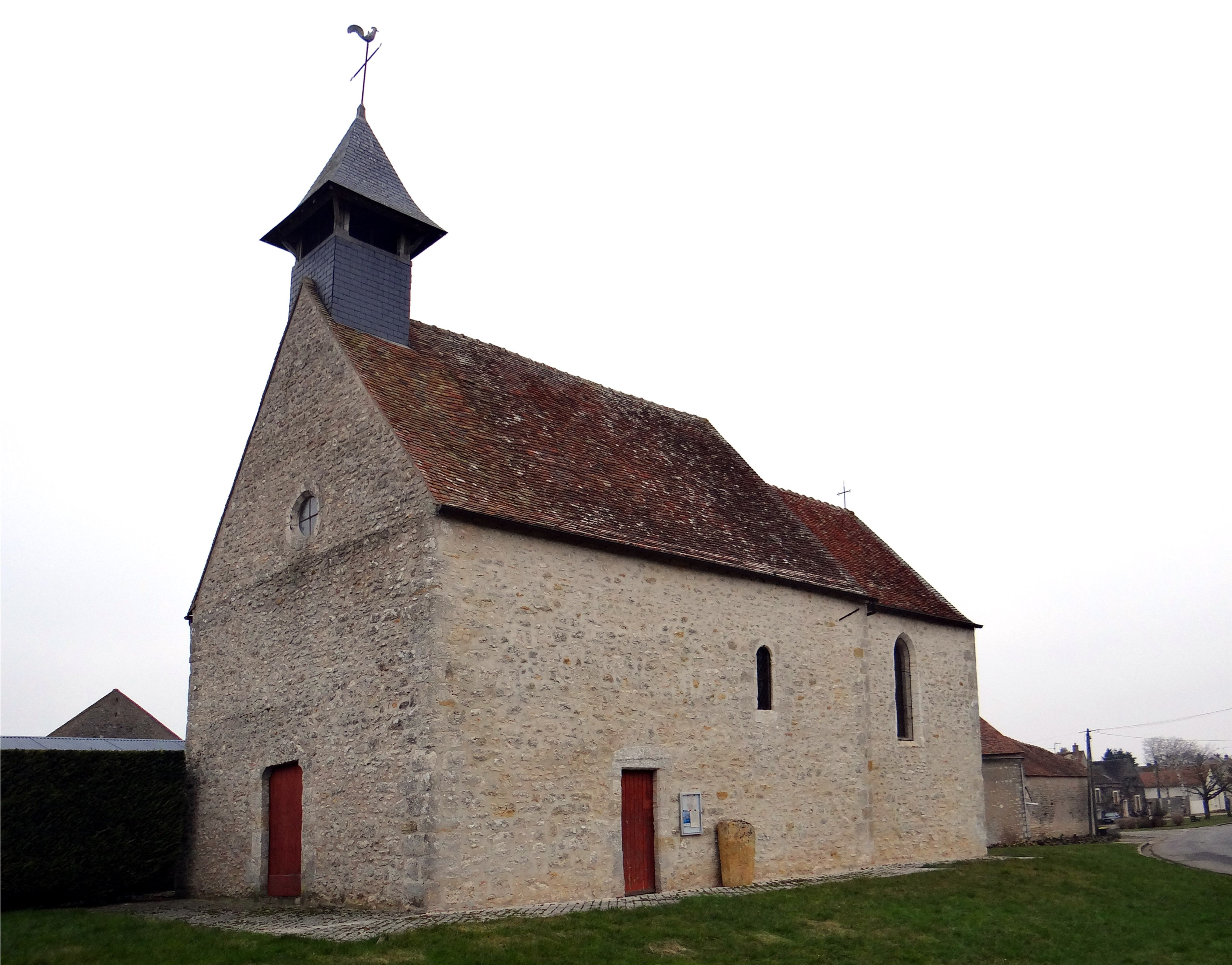 Église Saint-Laurent, hameau d'Herbeauvilliers, Buthiers, Seine-et-Marne, France.